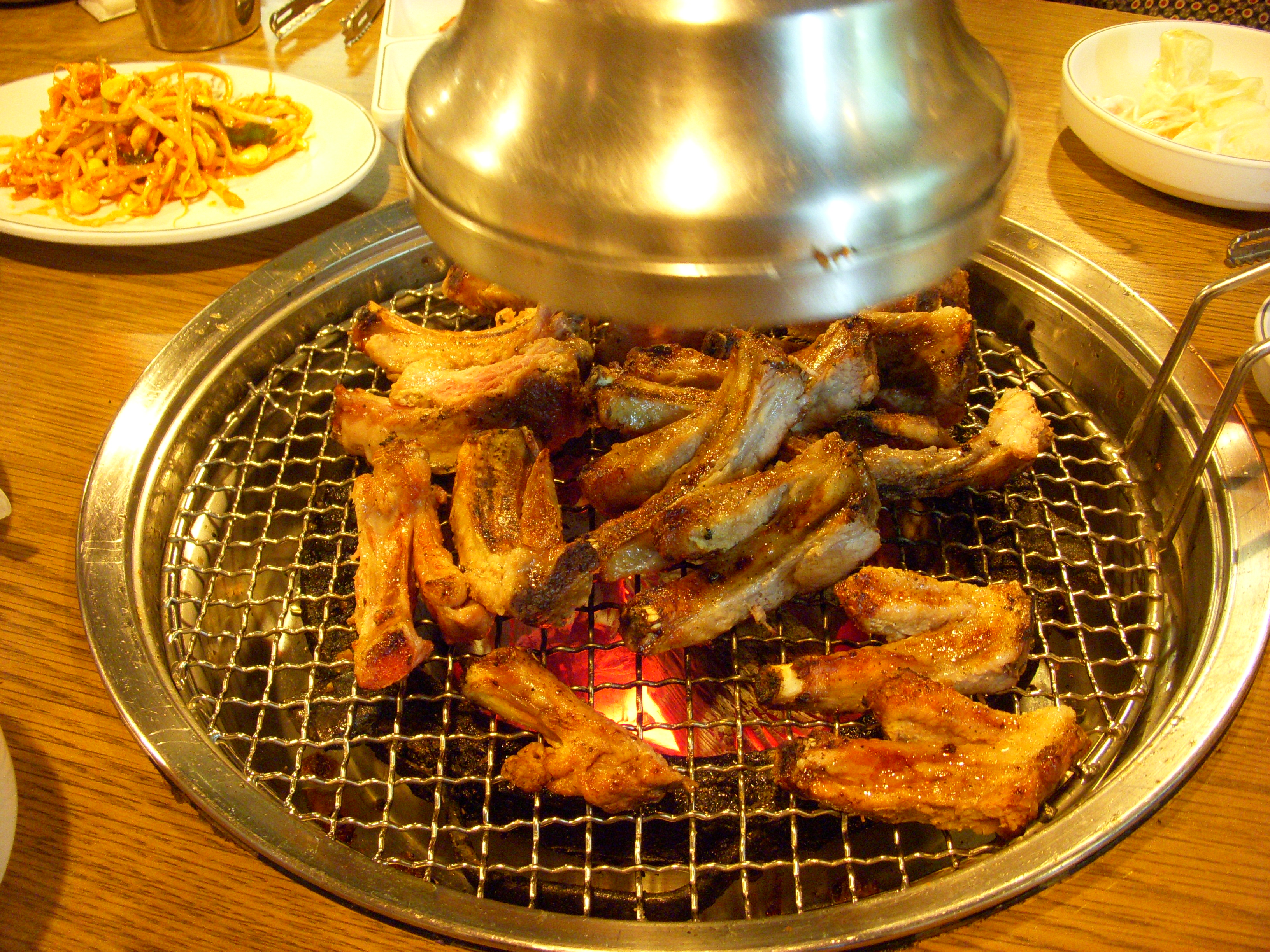 Galbi, Korean BBQ